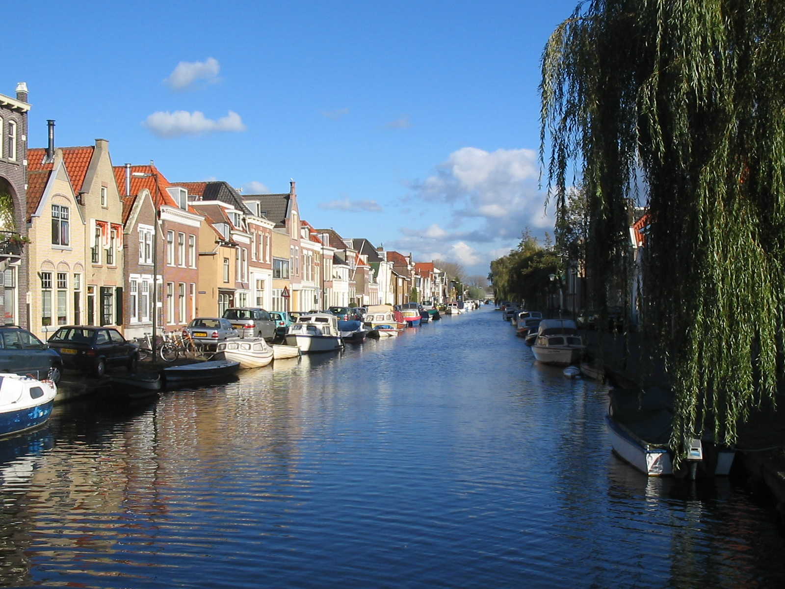 Noordvliet, Maassluis, november 2005